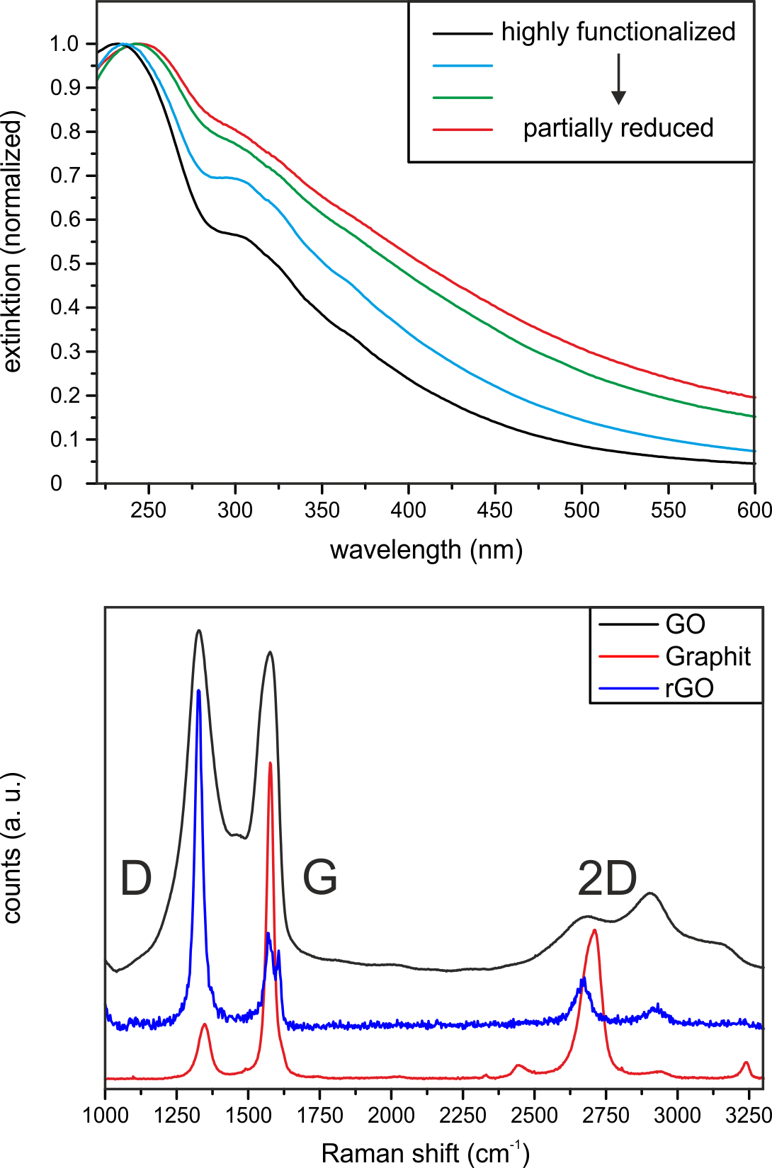 UV-vis and Raman Spectra of Graphene Oxide (GO), Graphene (rGO) and Graphite.